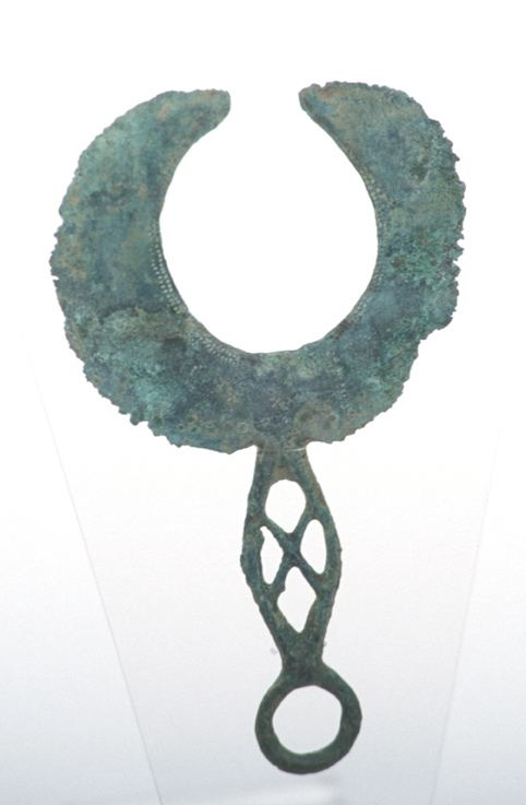 Rasoir exposé au Musée Historique et Industriel - Musée du Fer de Reichshoffen. Ce rasoir date de 1050 avant notre ère. Il a été découvert en 1970 à Reichshoffen.